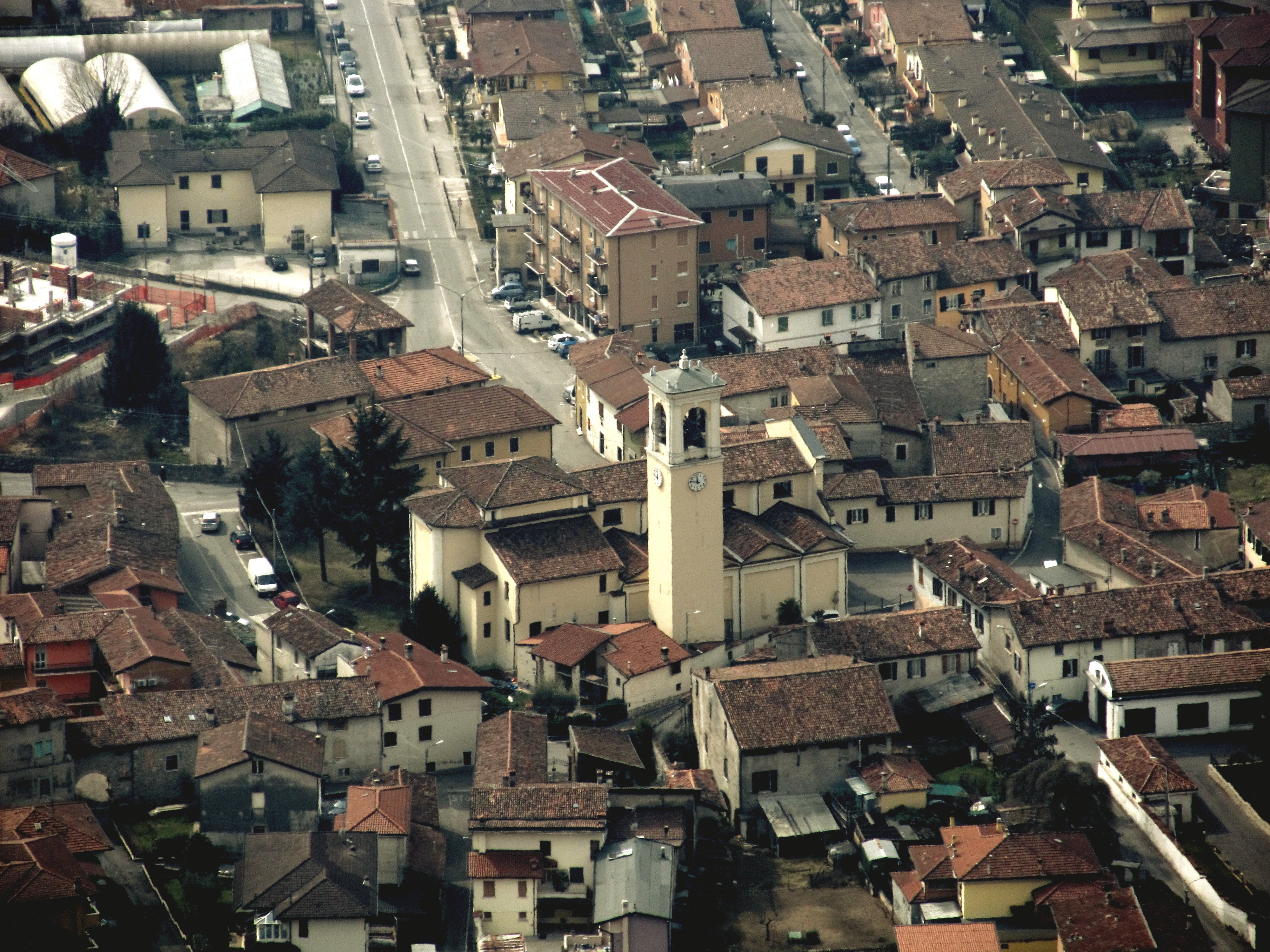 Frazione Pieve del comune di Concesio (BS), vista da località Colma. Opera propria dell'utente Kustur, scattata l'11 marzo 2012.